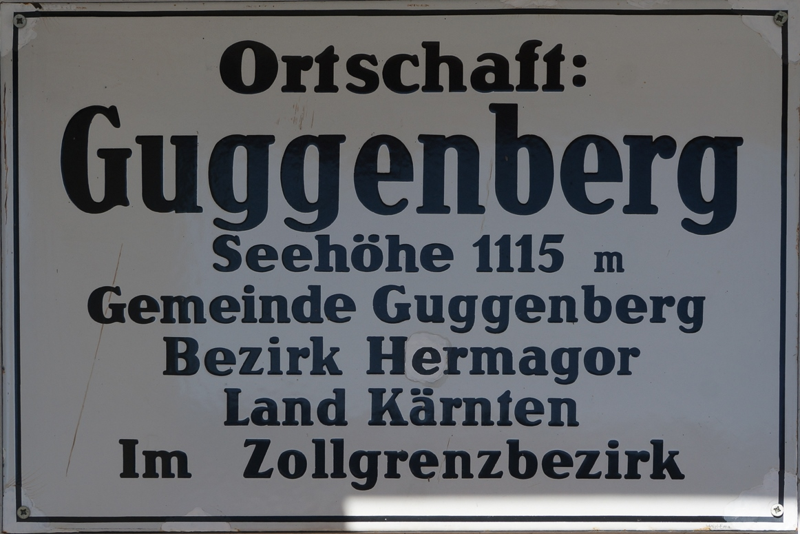 Ortschild in Guggenberg, Gemeinde Hermagor